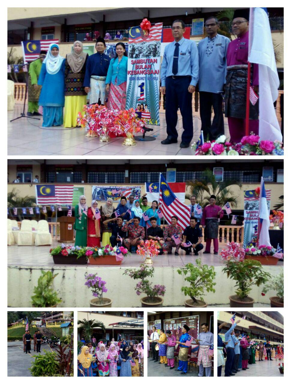 Sambutan Hari Kebangsaan SMKBBB